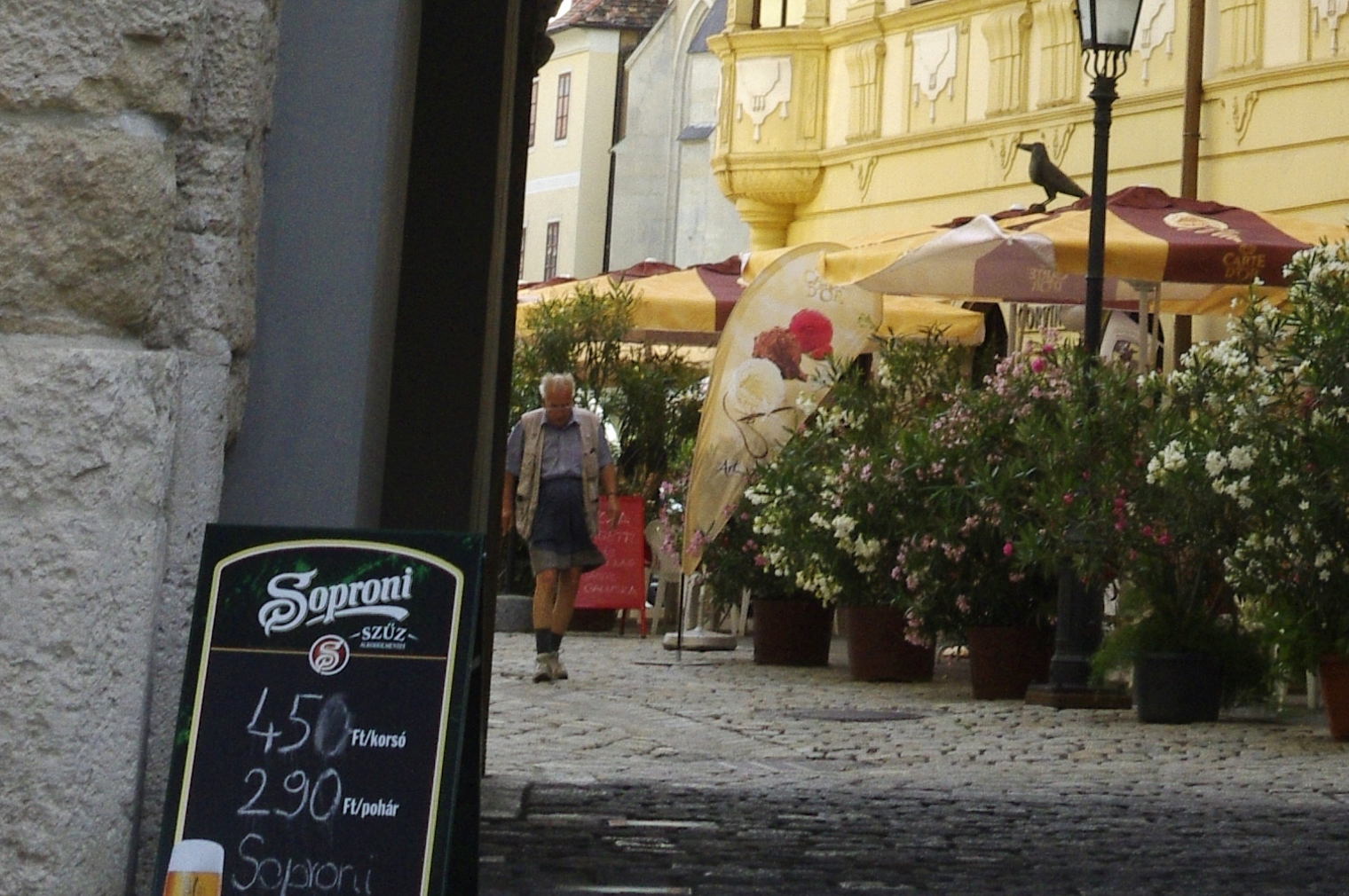 Sopron, Ungarn - Stadtturm, Blickrichtung: Hauptplatz (Fö tér), an der Mauer Preistafel des nahen Restaurants mit Preisen für Soproni Bier. This is a photo of a monument in Hungary, Identifier: 4779